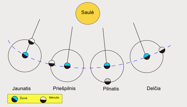 Mėnulio fazės Perpiešė User:Ausis su Inkscape